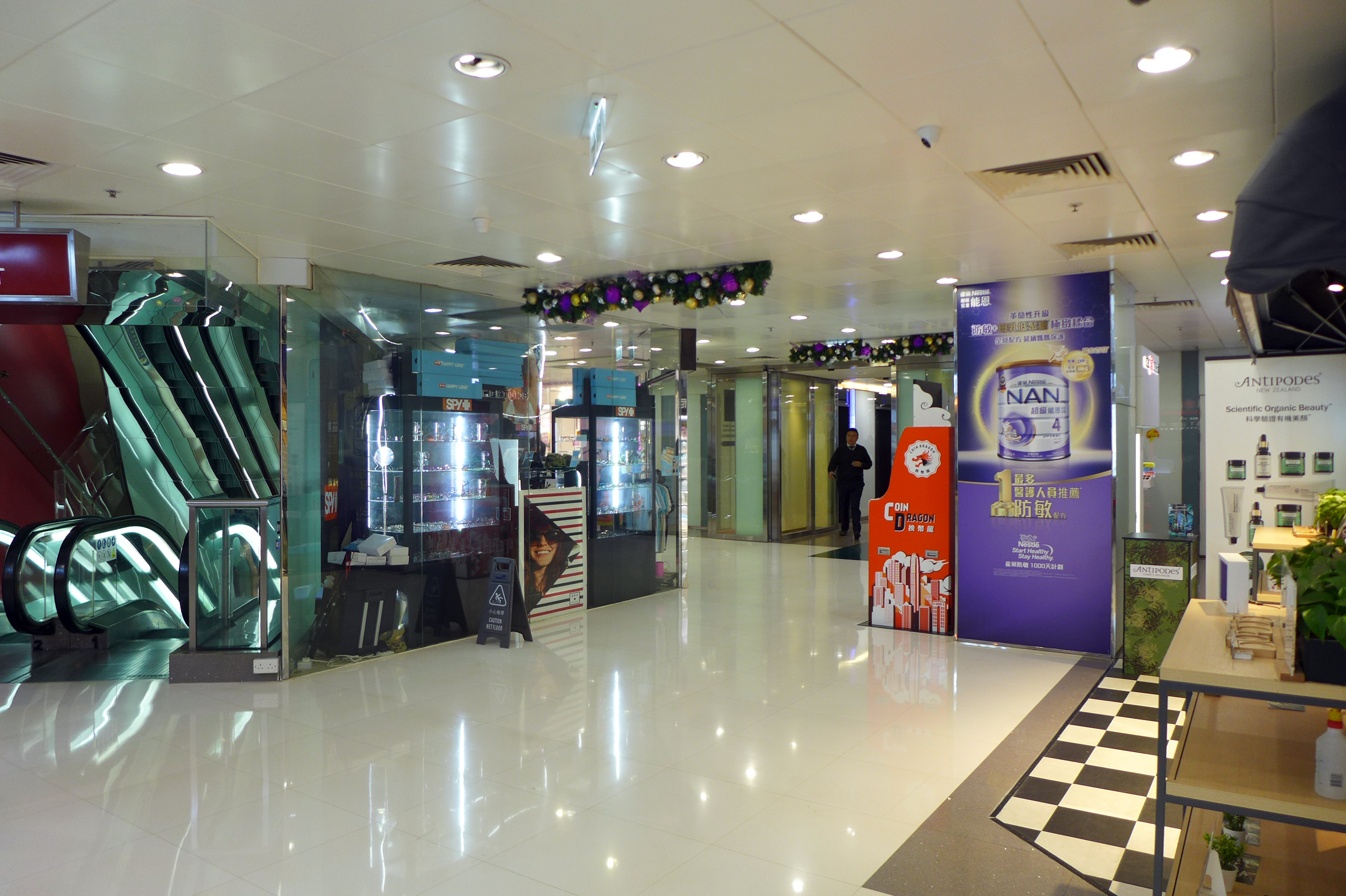 Hollywood Plaza GF Arcade